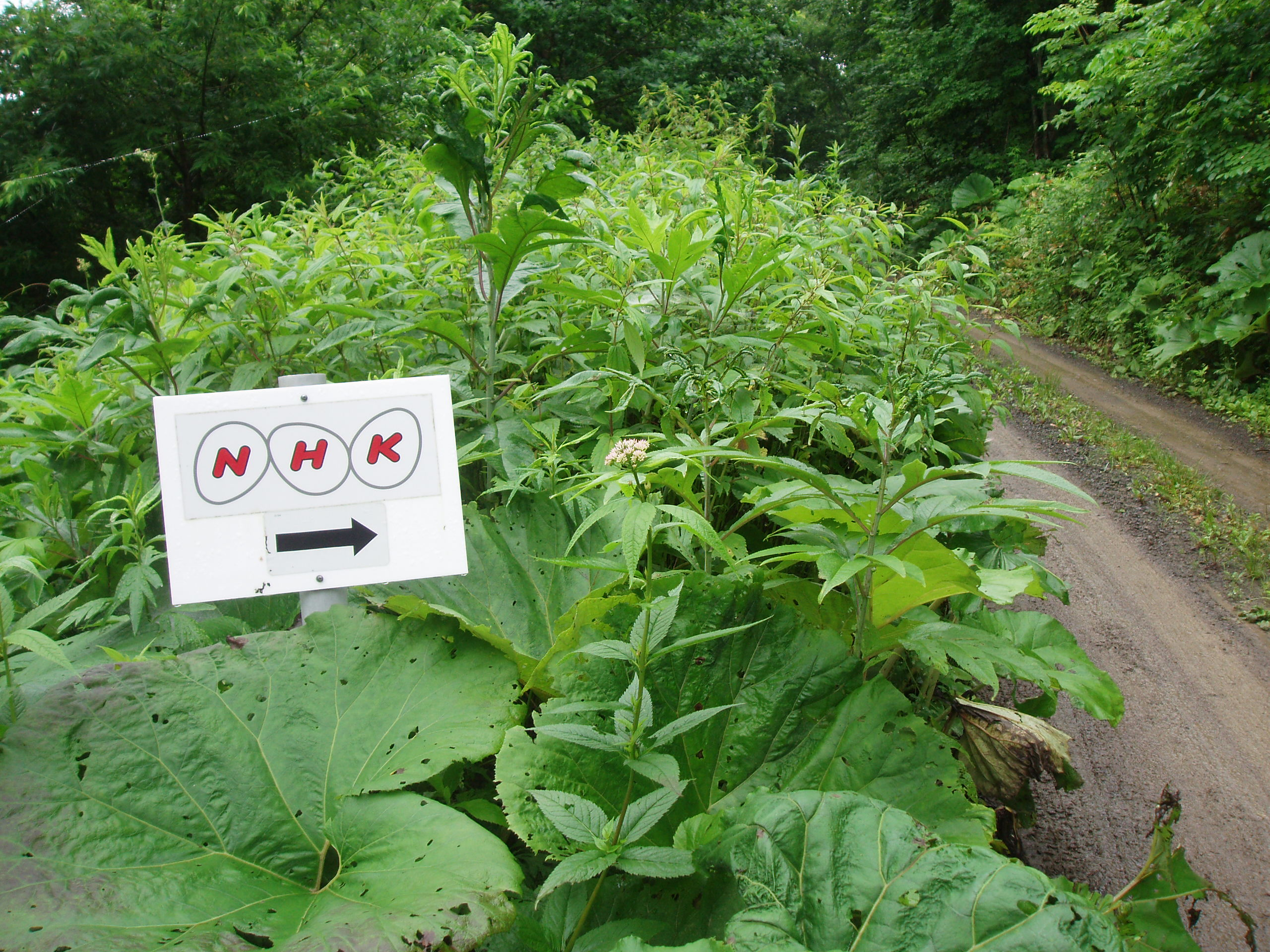 佐呂間知来中継局 NHK看板